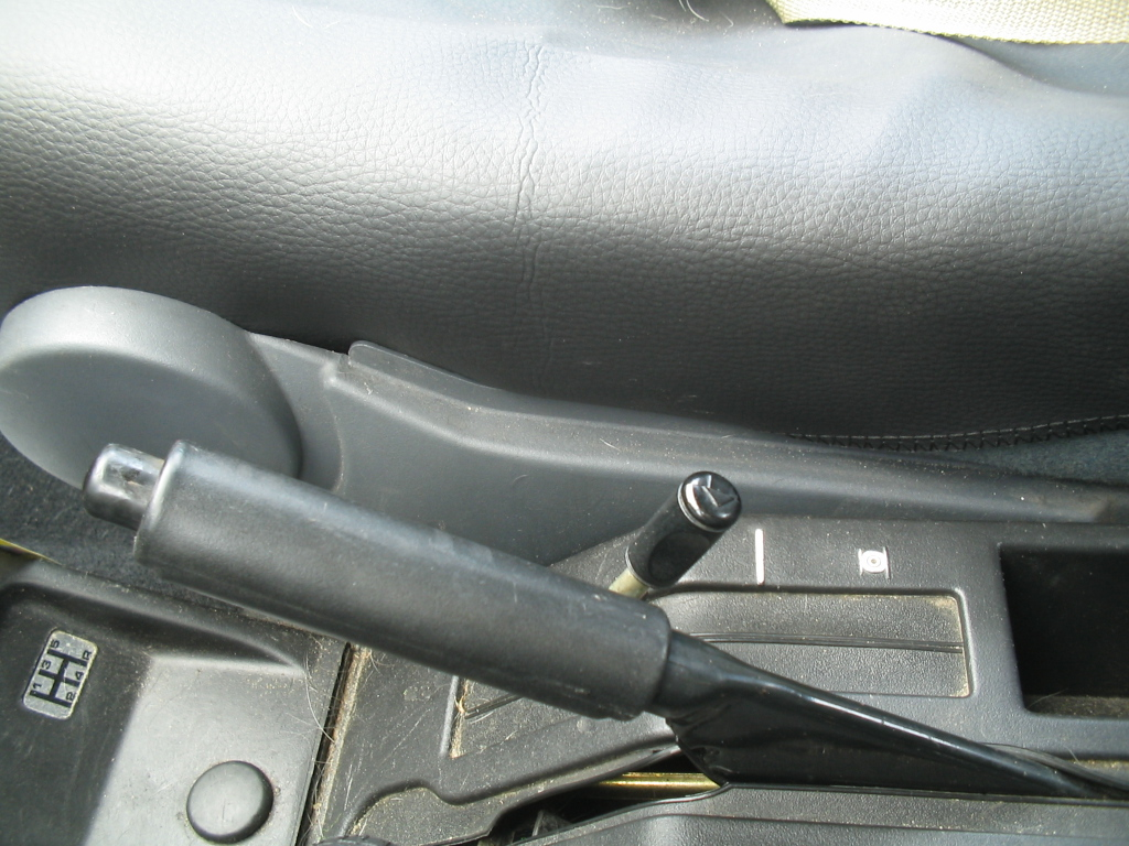 handrem BX